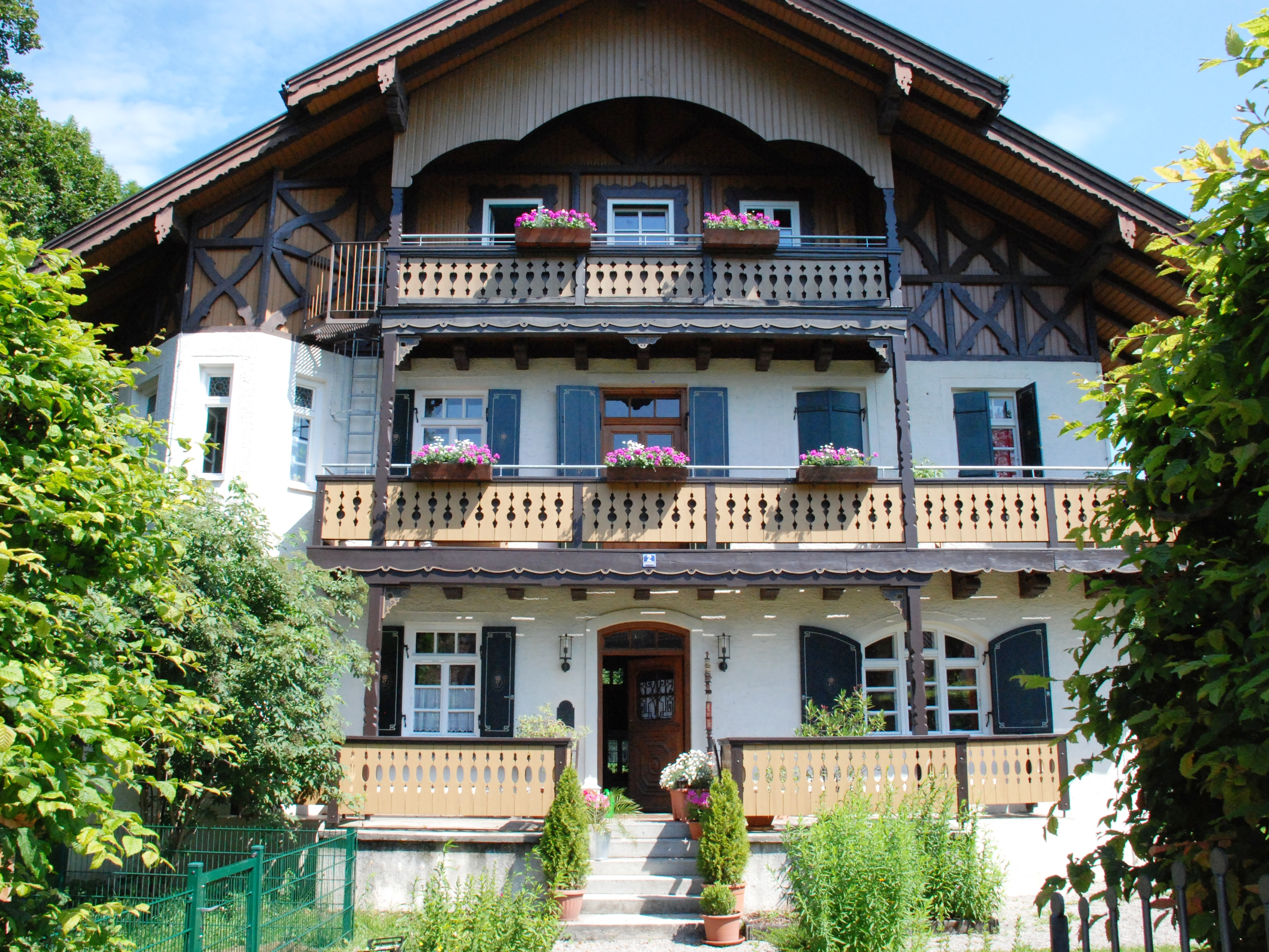 Villa Liebhard in der Bahnhofstraße in Aying, Landkreis München, Bezirk Oberbayern, Bayern. Als Baudenkmal in der Bayerischen Denkmalliste unter Aktennummer D-1-84-137-64 aufgeführt. Laut Denkmalliste von Joseph Leserer 1908/1909 erbaut. Foto gemäß den Voraussetzungen zur Panoramafreiheit von öffentlicher Verkehrsfläche aus aufgenommen.